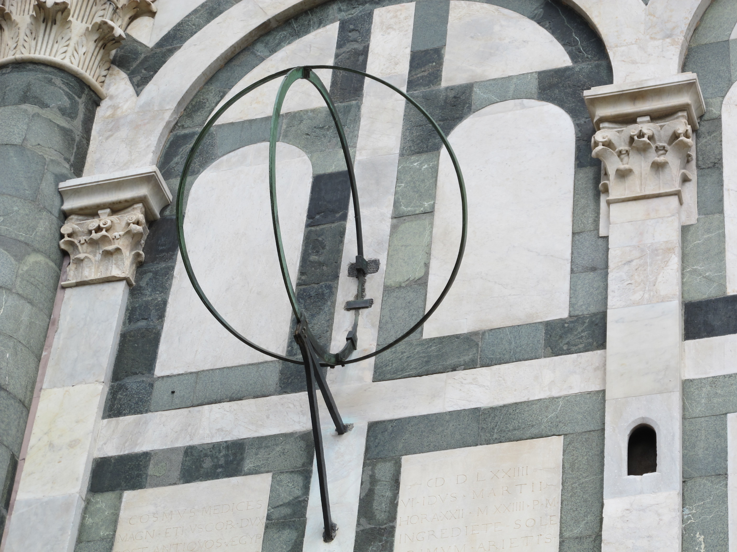 Smn, armilla equinoziale